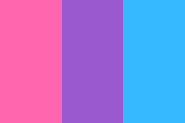 A faixa rosa representa o feminino, a azul representa o masculino e a roxa representa o gênero andrógine